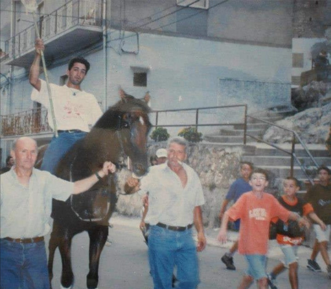 Palio di San Rocco 1998